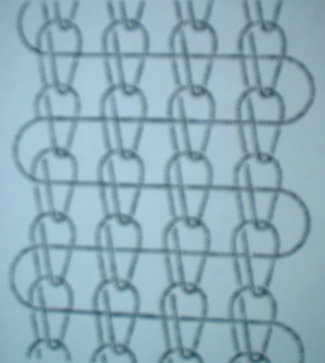 Schema: Struktur des Häkelgalongewirks